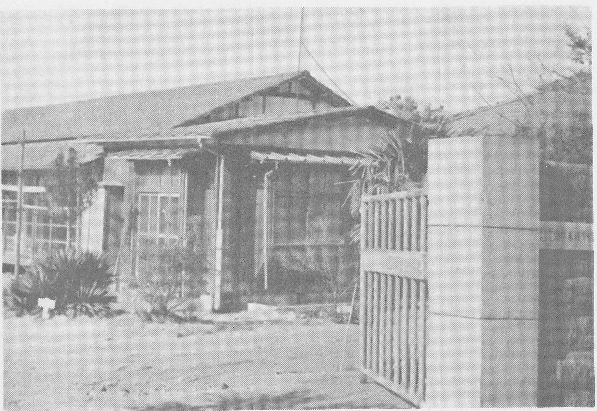 廃園となった養護施設に関する入園案内パンフレット抜粋